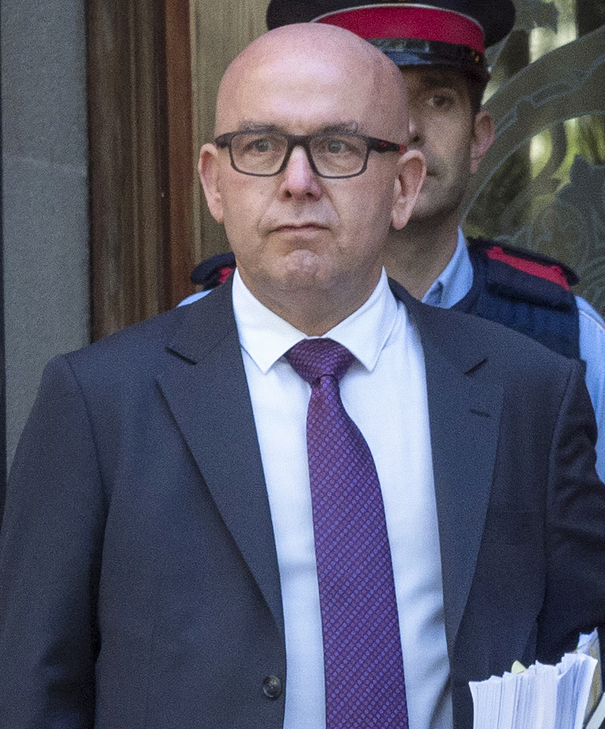 190515_25271_dc